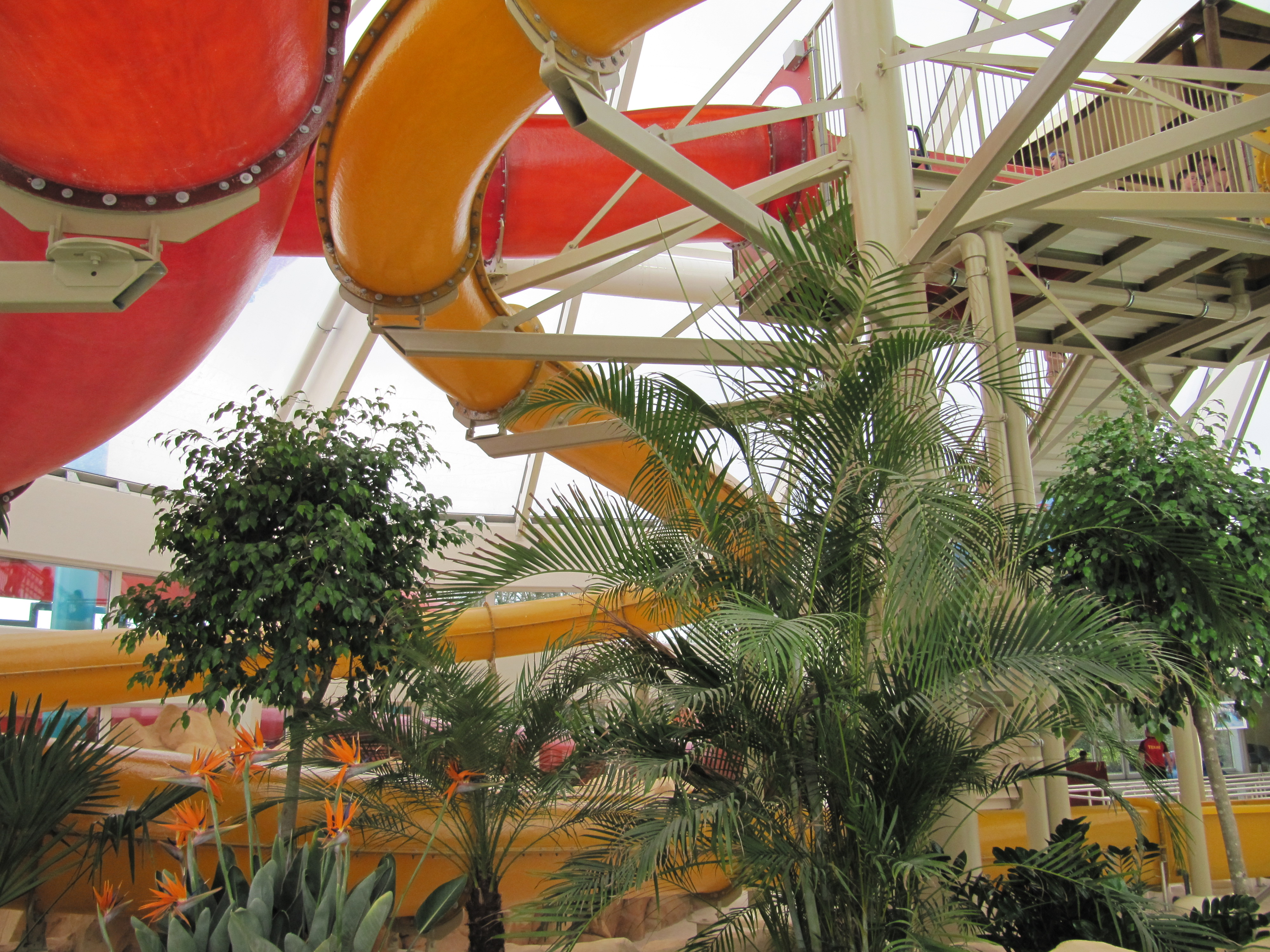 Toboggans surf et jet